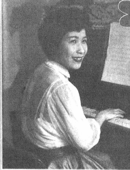 読売新聞社『家庭よみうり』387号（1954年）より菊池章子